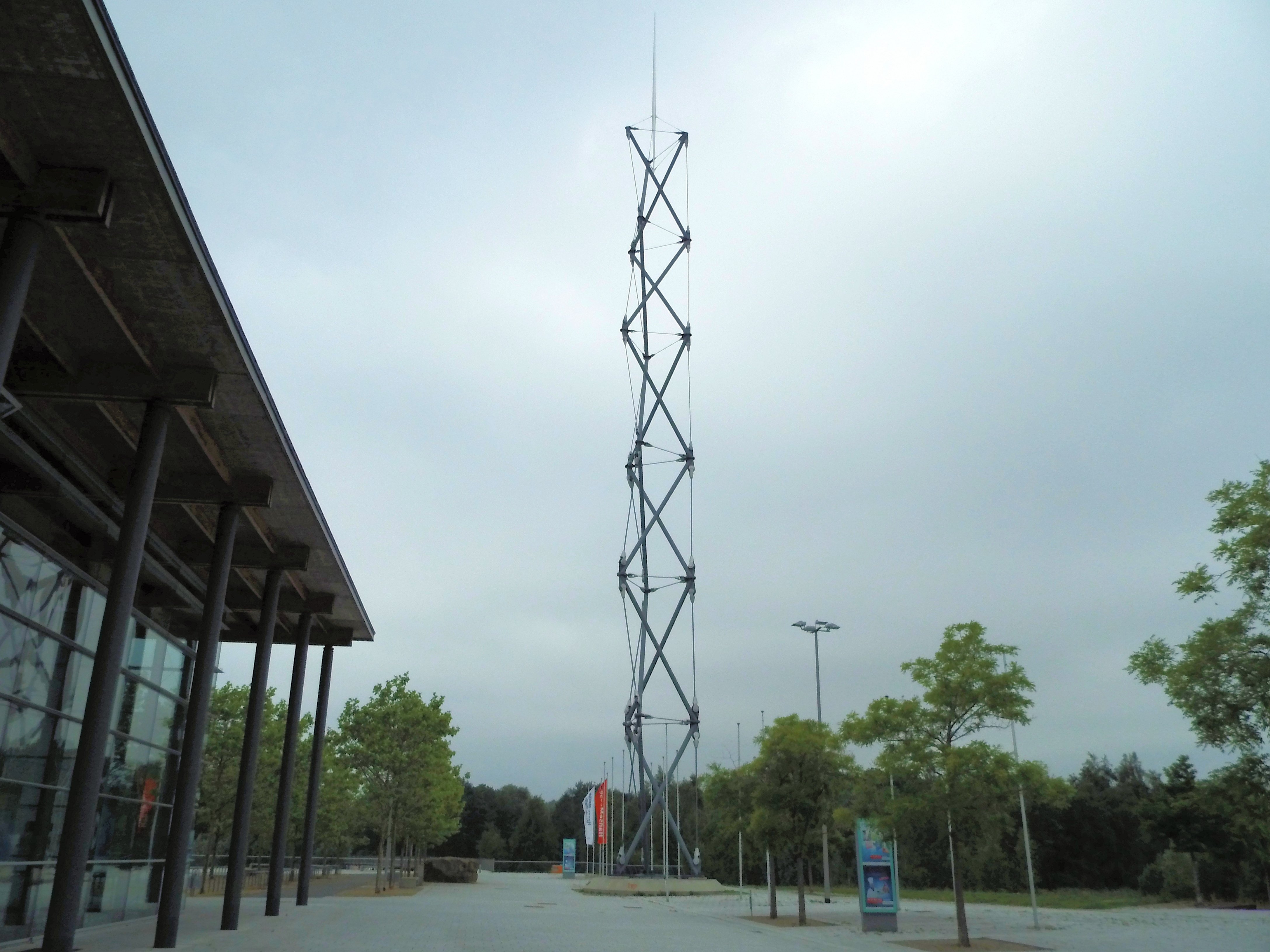 Der Messeturm vor dem IGA Park in Lütten Klein